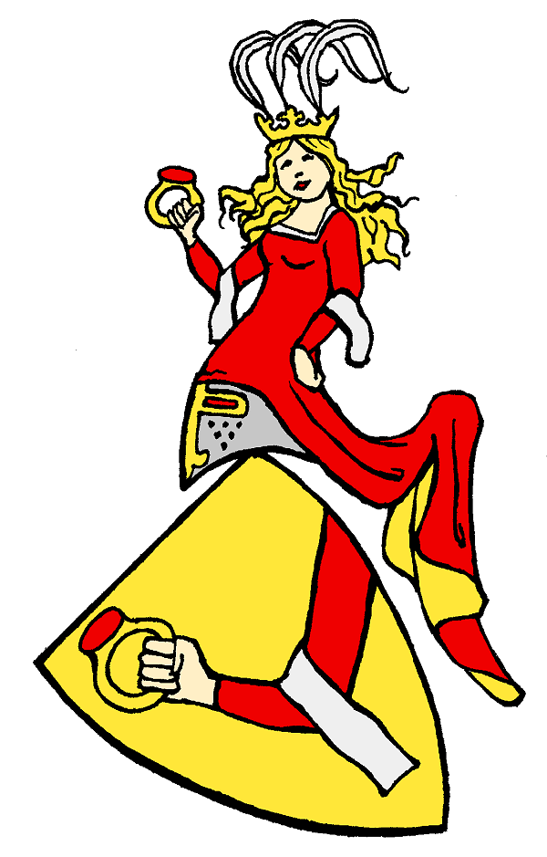 Stammwappen der von Lehwaldt